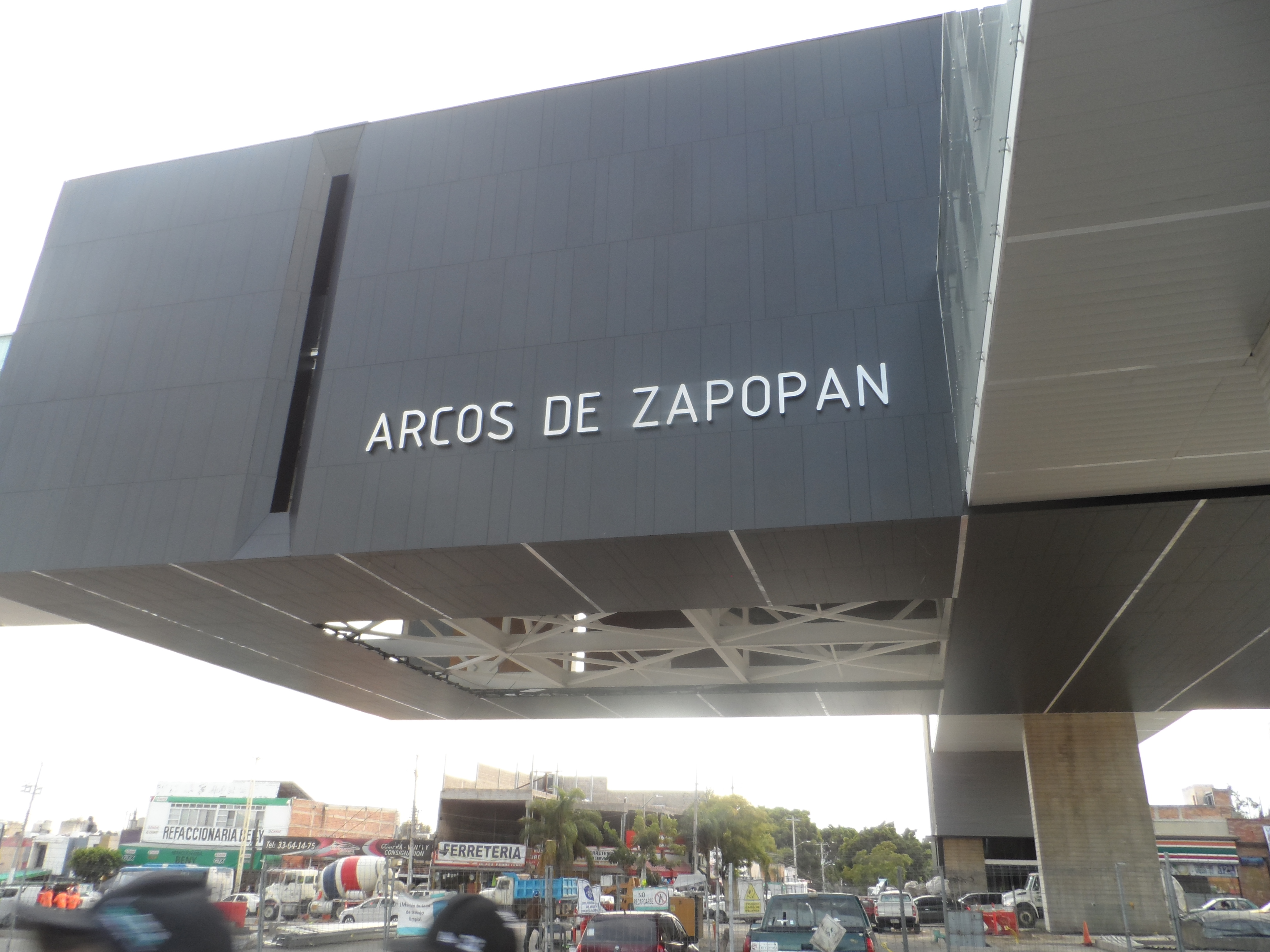 Vista externa de la estación "Arcos de Zapopan" de la Línea 3 del Tren Ligero de Guadalajara.